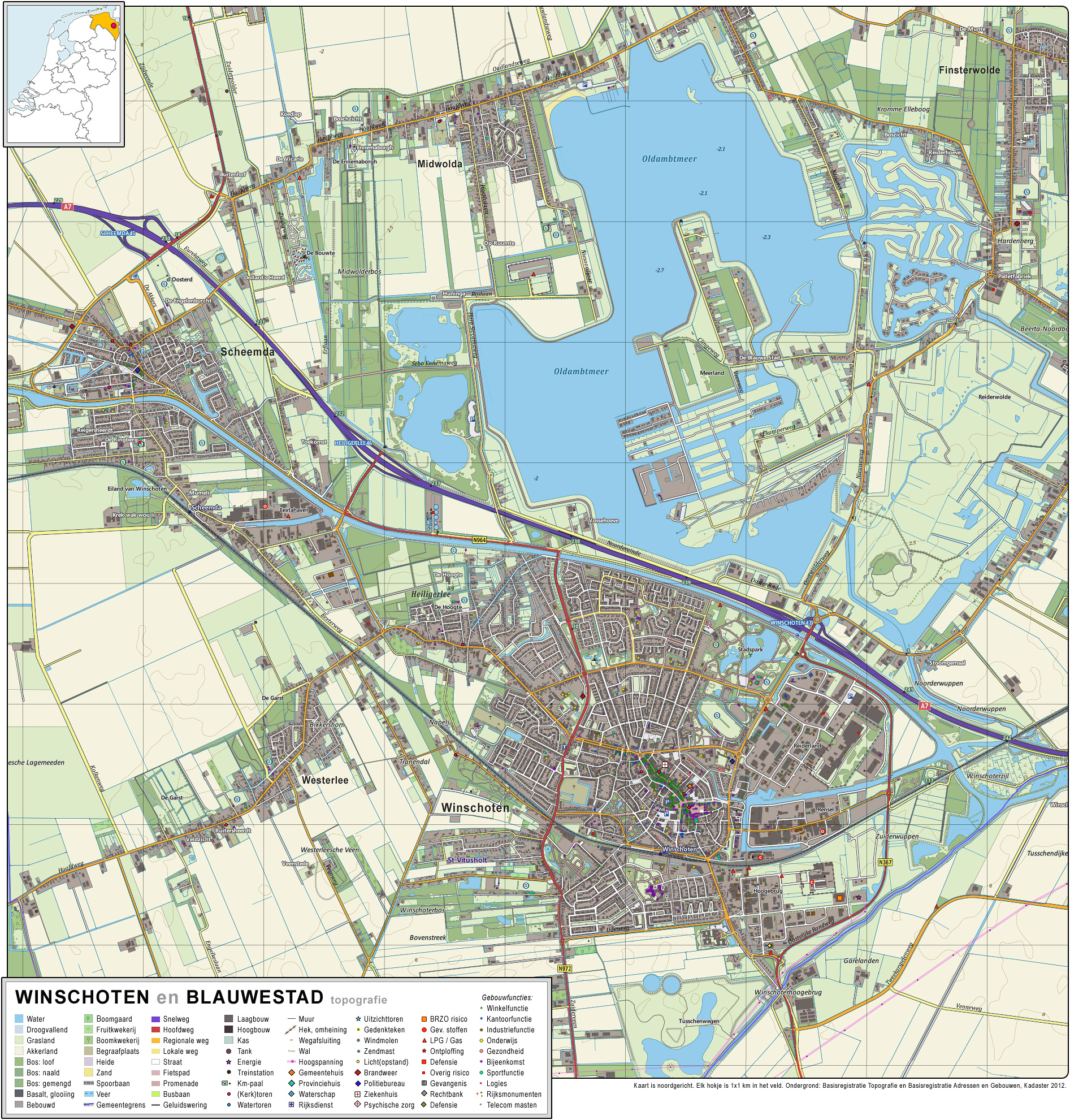 Topografisch beeld van de stad Winschoten met het aangrenzende Blauwestad. Op basis van de GML open geodata van de BRT/Top10NL (basisregistratie Topografie, Kadaster 2012), vrijgegeven door Kadaster op 30-11-2012 onder de Creative Commons BY licentie. Gebouwvlakken vanuit Open Geodata BAG extract (december 2012). Samenstelling en kleurenschema: Jan-Willem van Aalst.